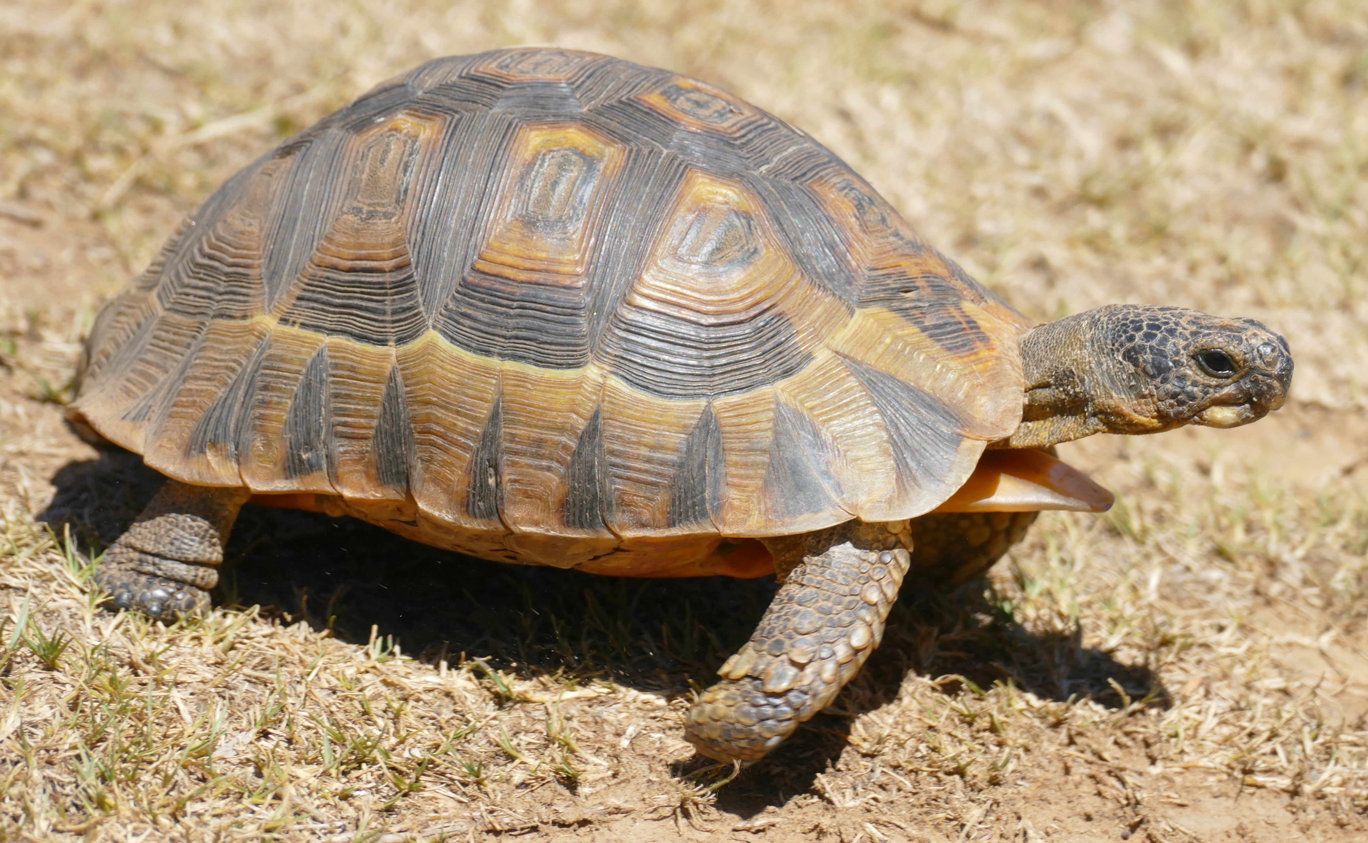 Lang Elsie's Kraal Rest Camp, Bontebok NP, Western Cape, SOUTH AFRICA